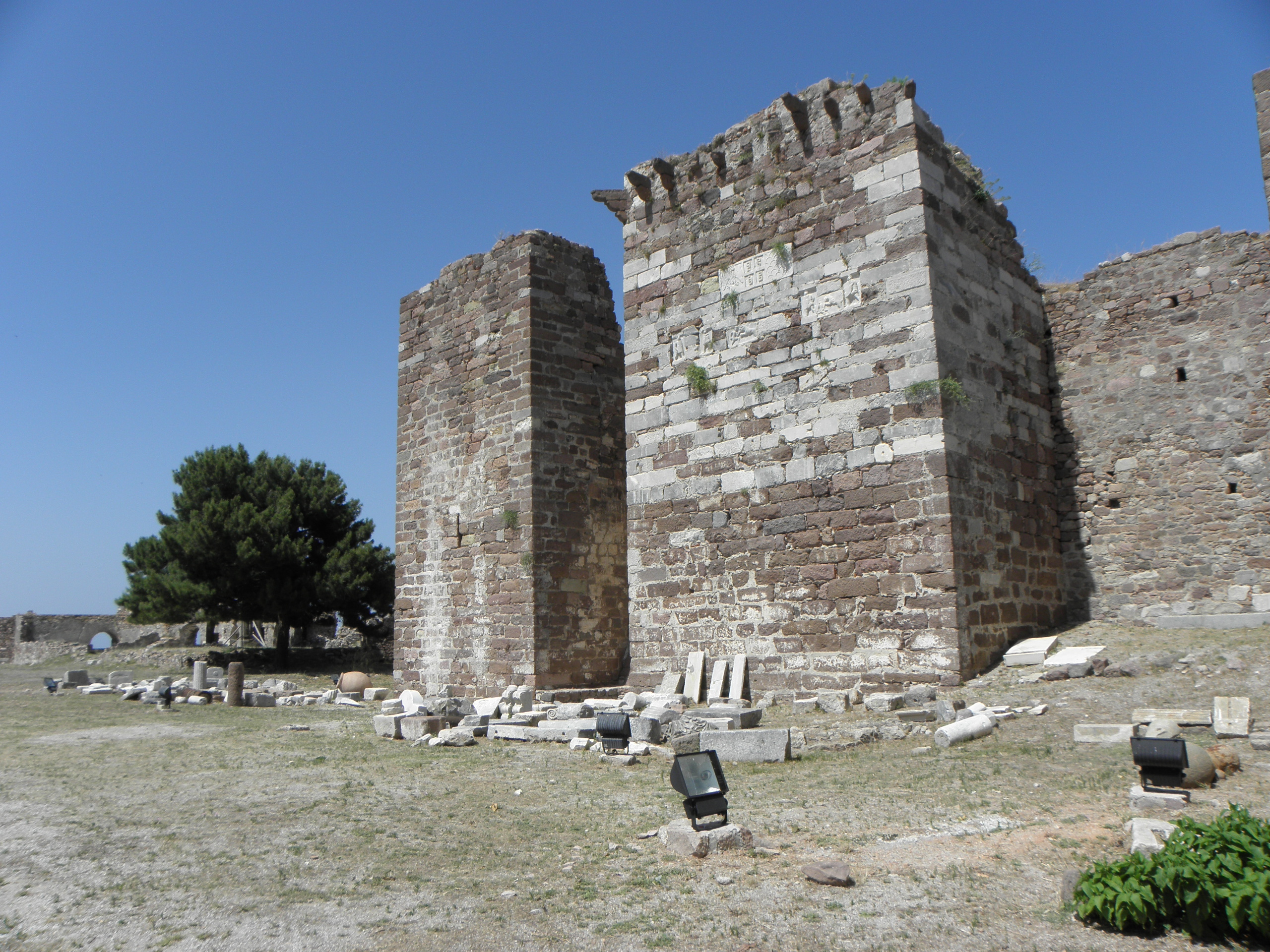 Pevnost v Mytiléně, Lesbos